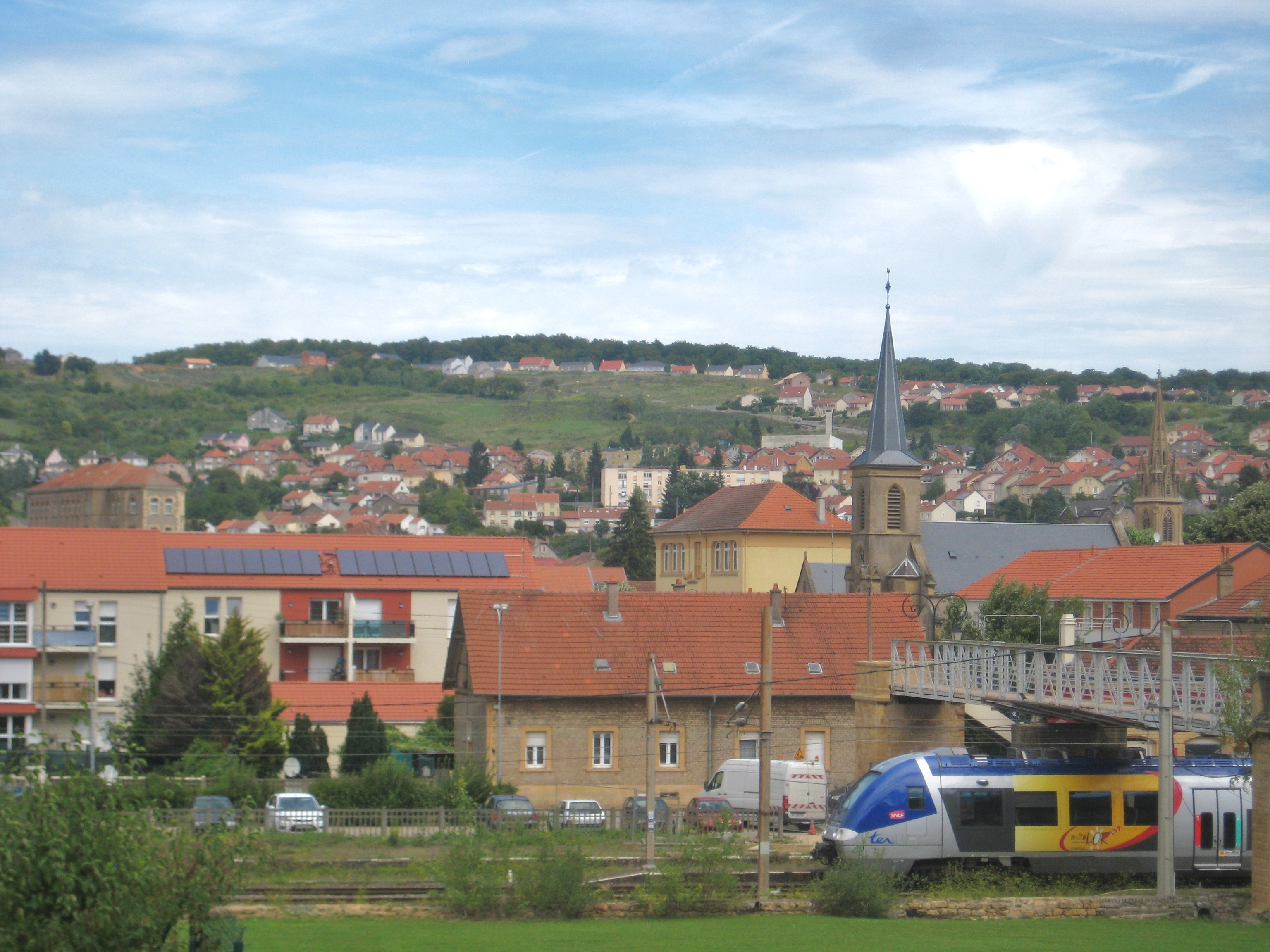 Description vue de Moyeuvre vue de Moyeuvre